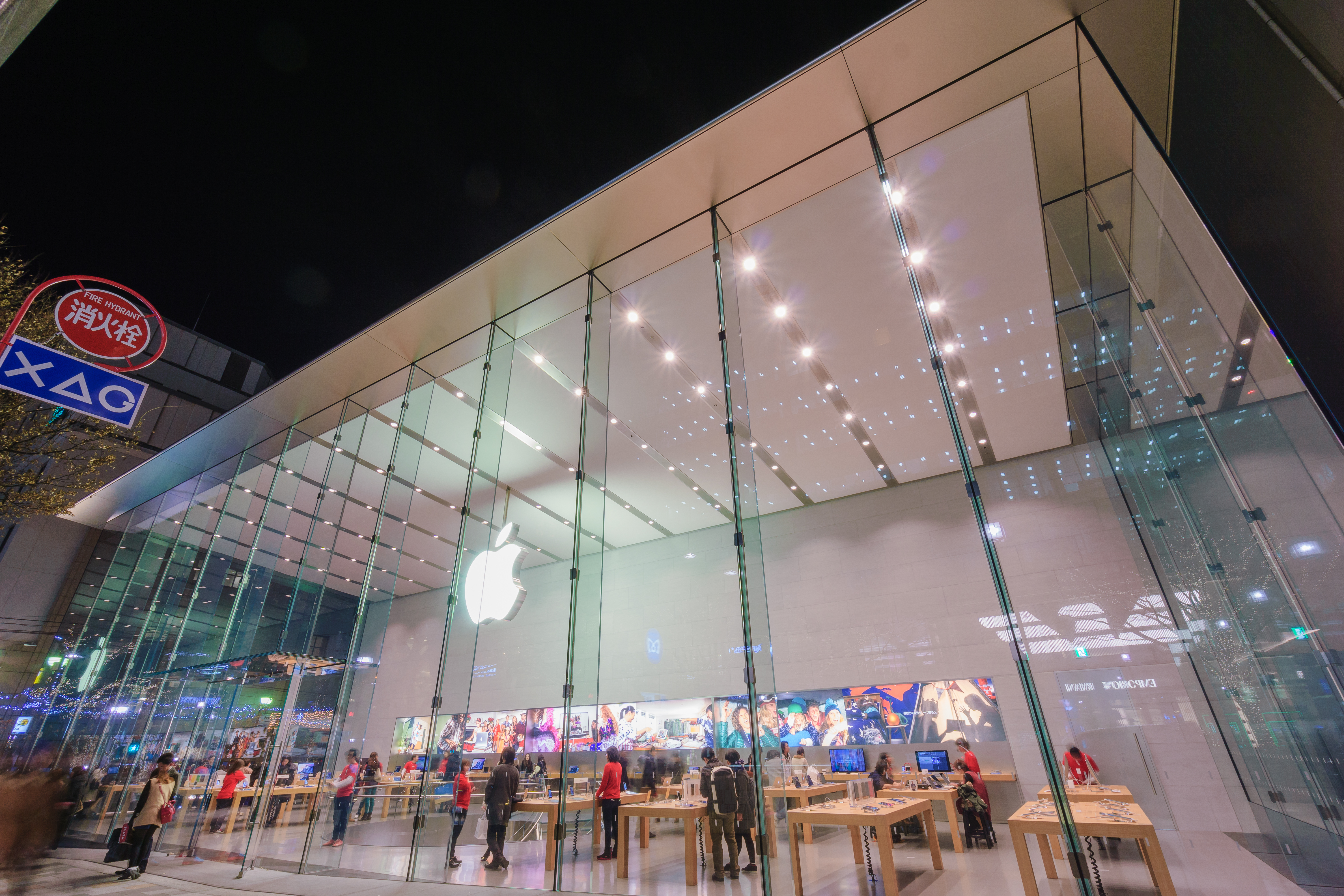 表参道 / Omotesando